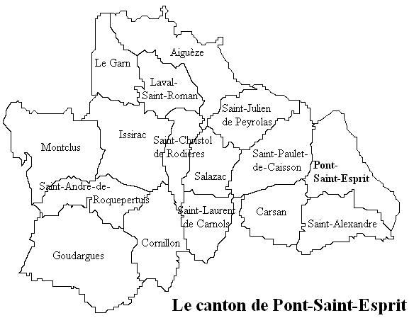 Le canton de Pont Saint Esprit Image personnelle